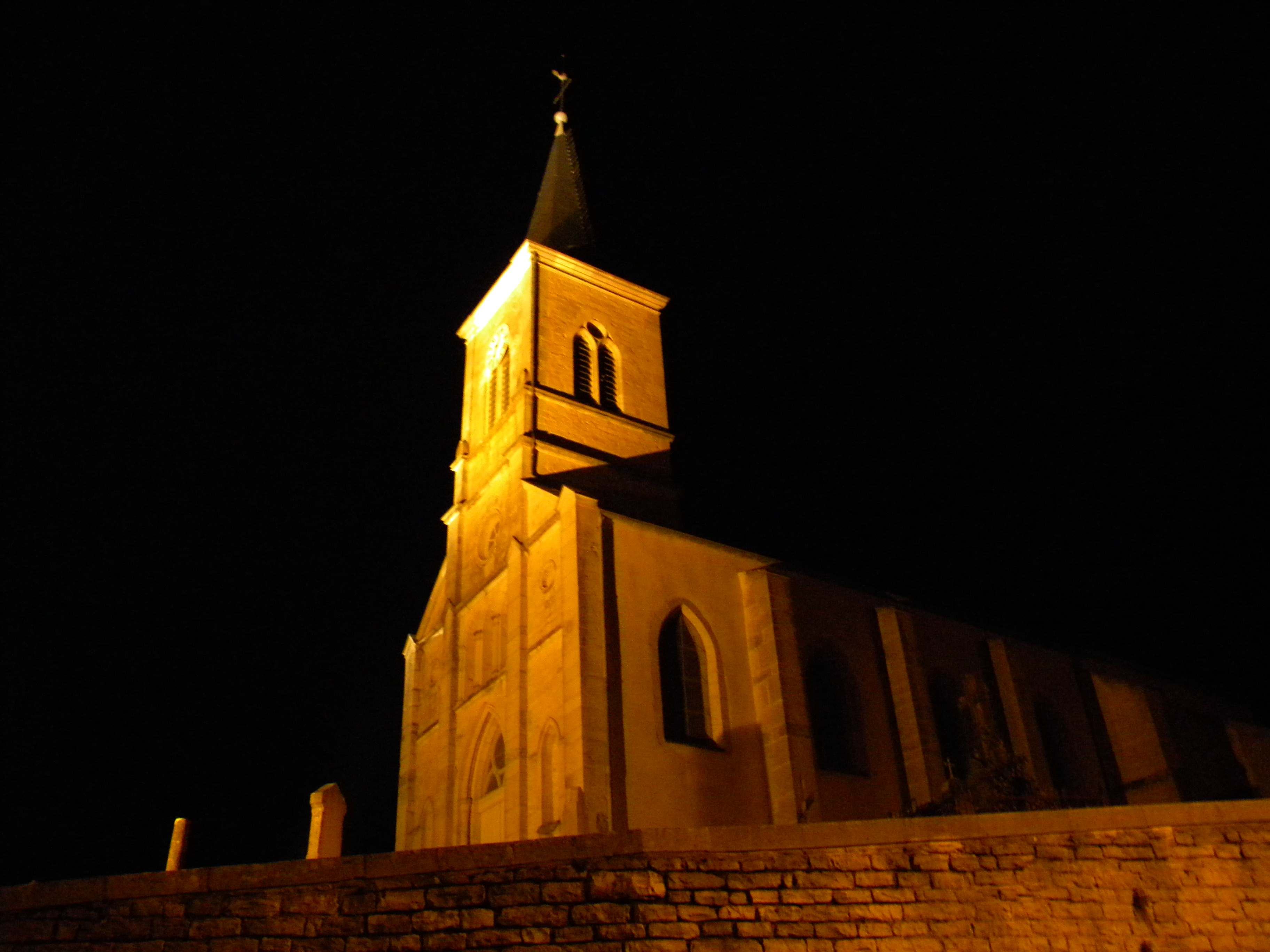 Arcenant